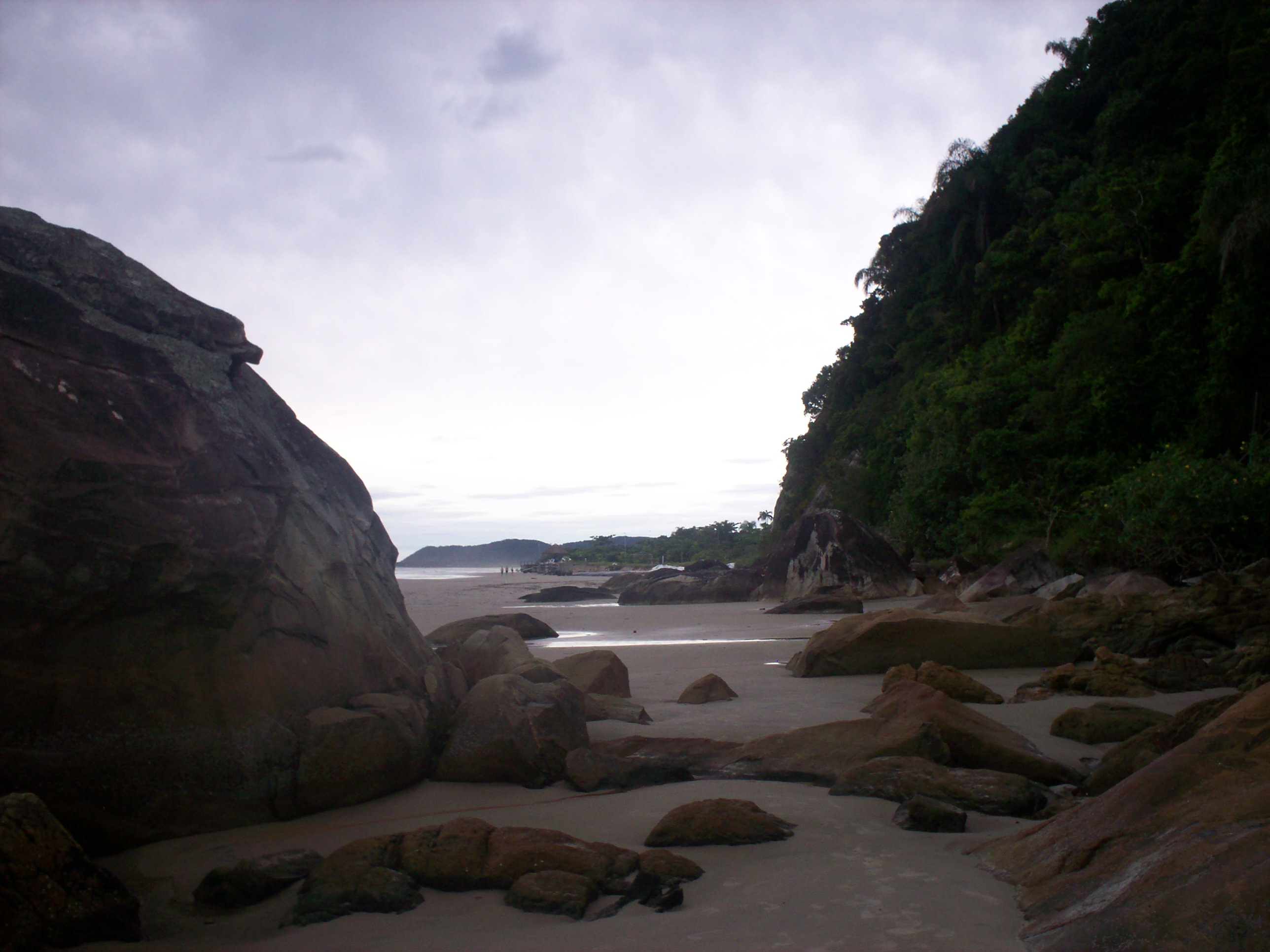 Pedras de praia localizada na Ilha do Mel, Paraná, Brasil